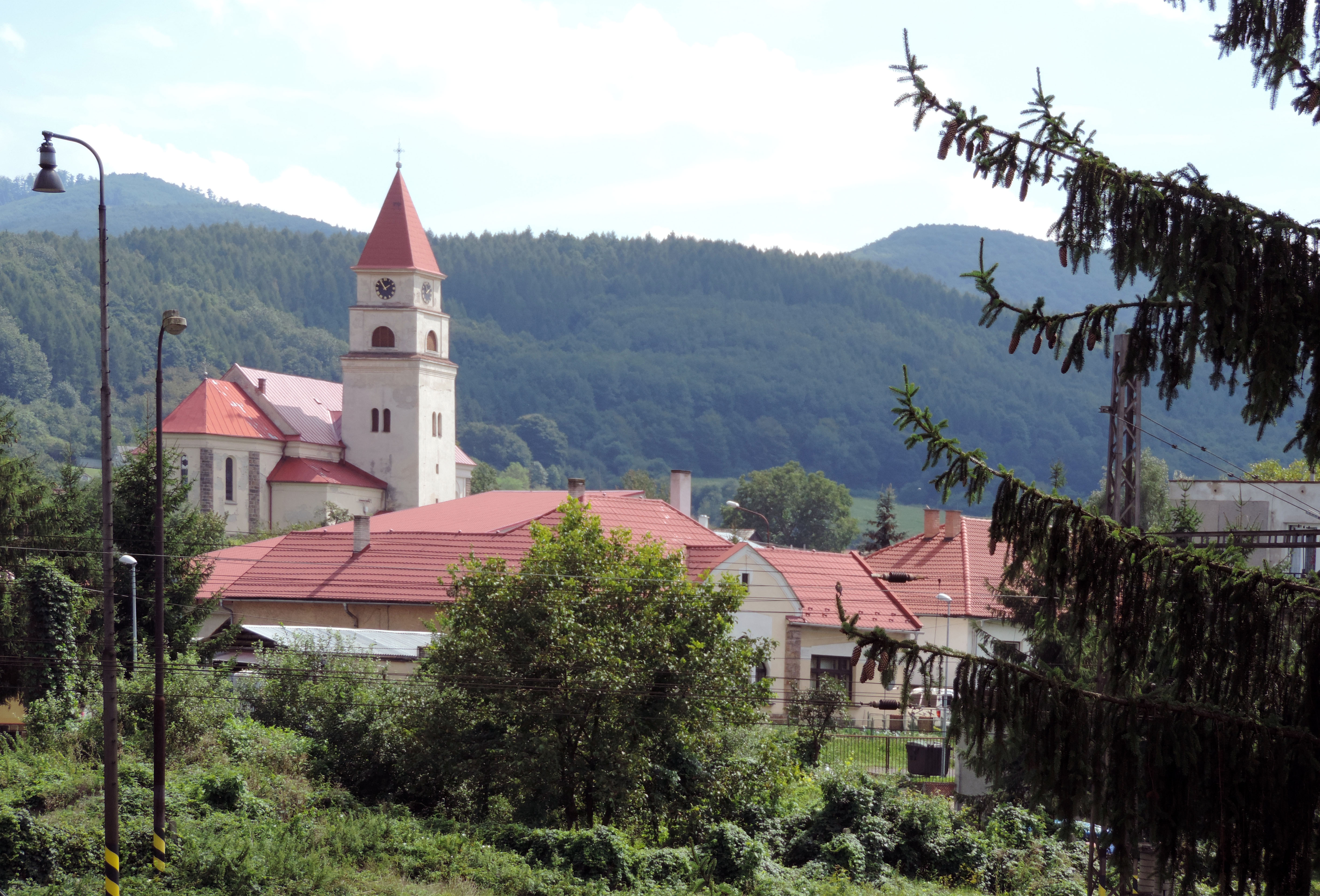 Pohľad na kostol